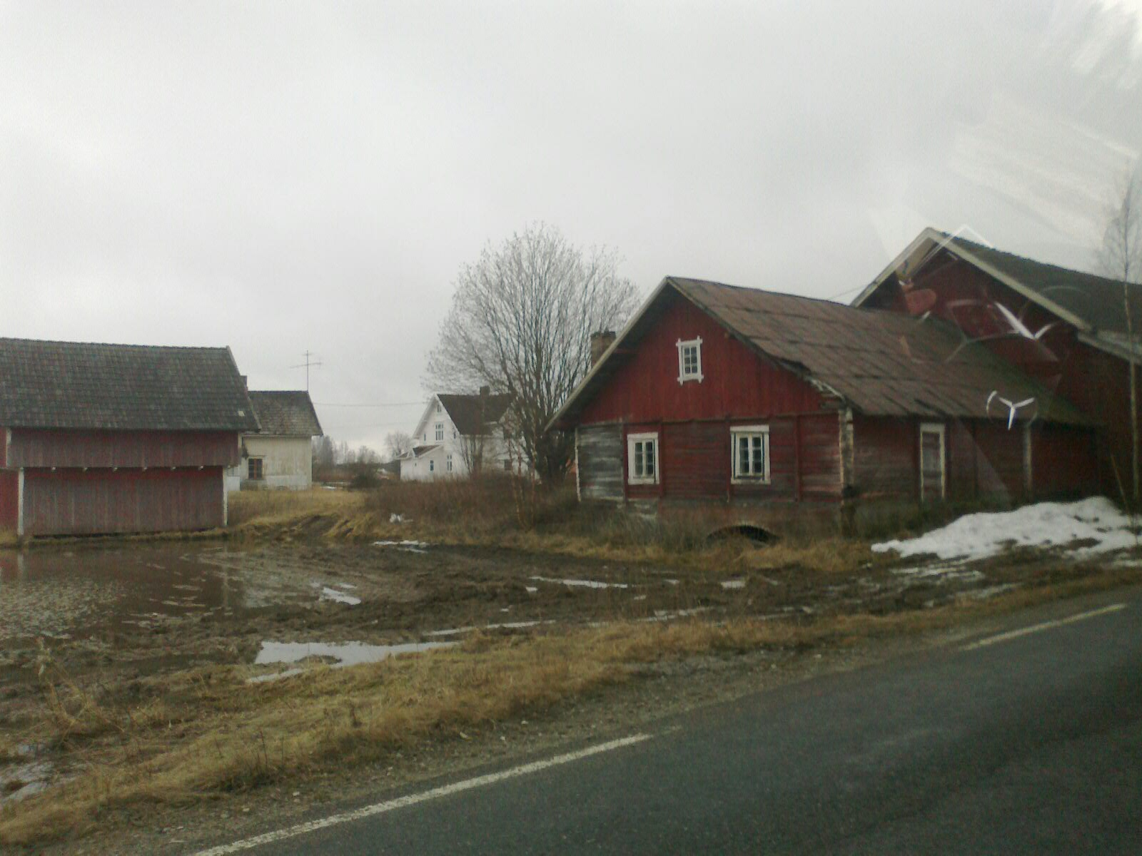 Dette bilde er av gården Aanmoen. Her kan vi se større deler av låven.